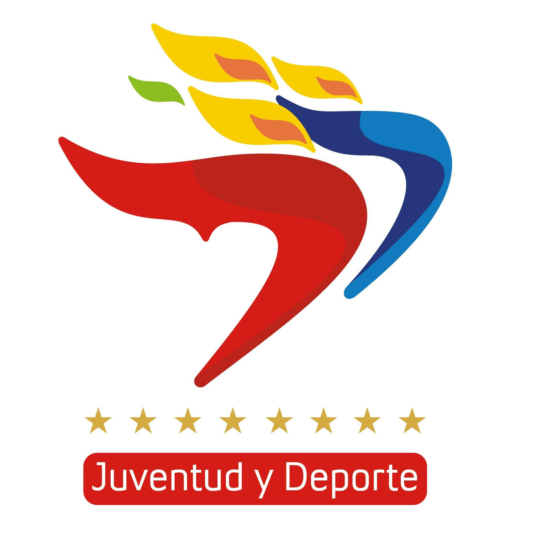 Ministerio del Poder Popular para la Juventud y Deporte